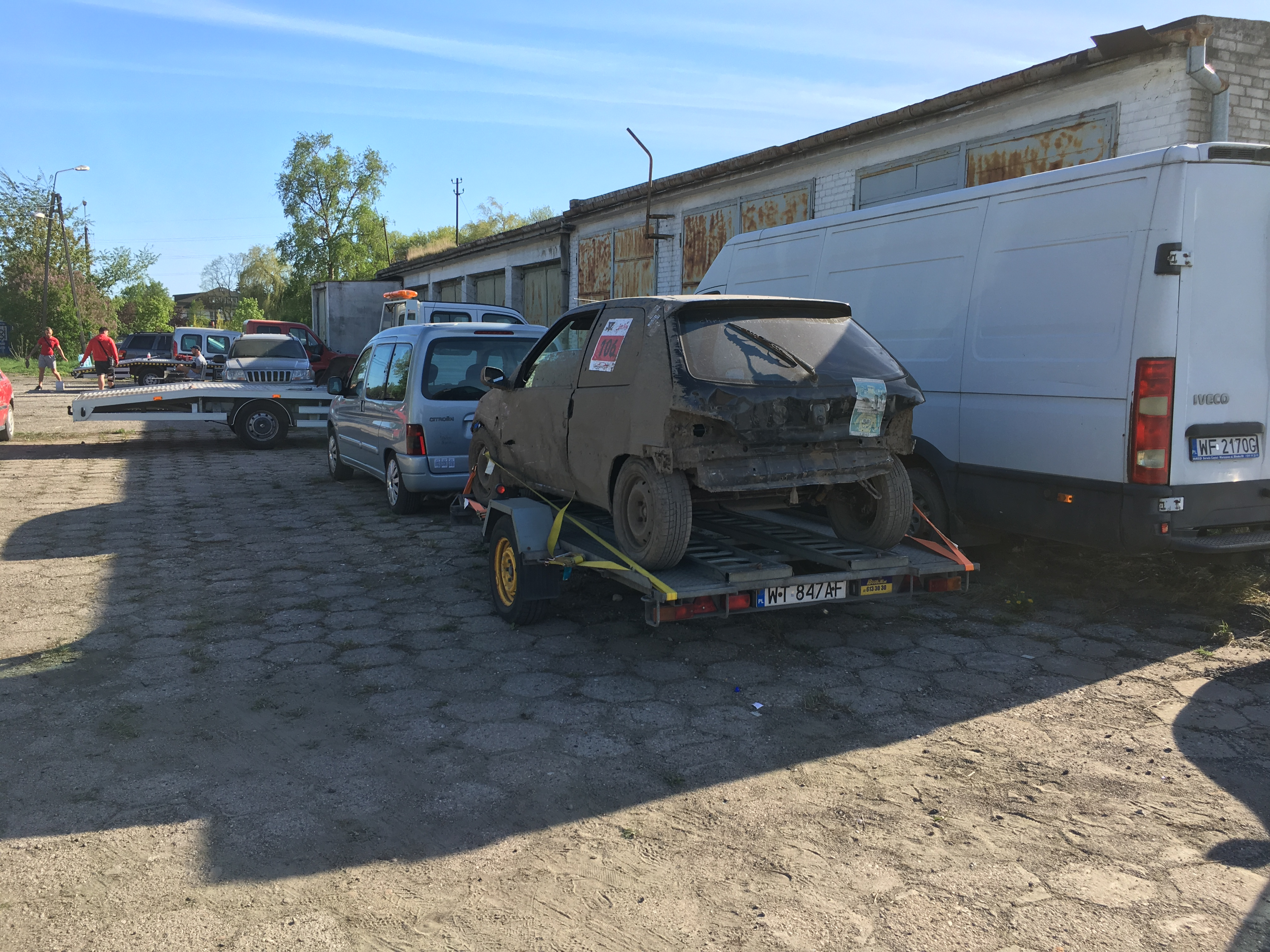 Powrót z zawodów Wrak Race na lawecie